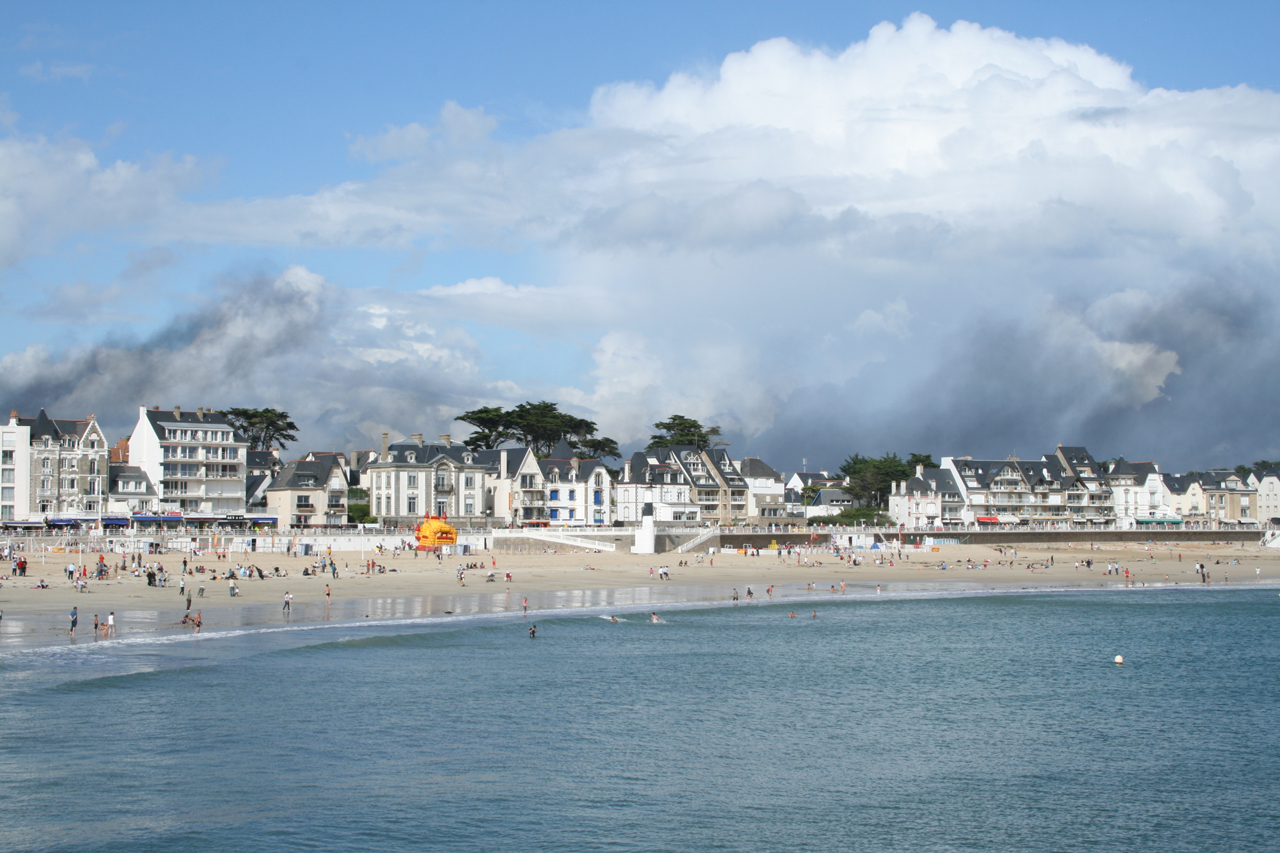 Plage de Quiberon (France)